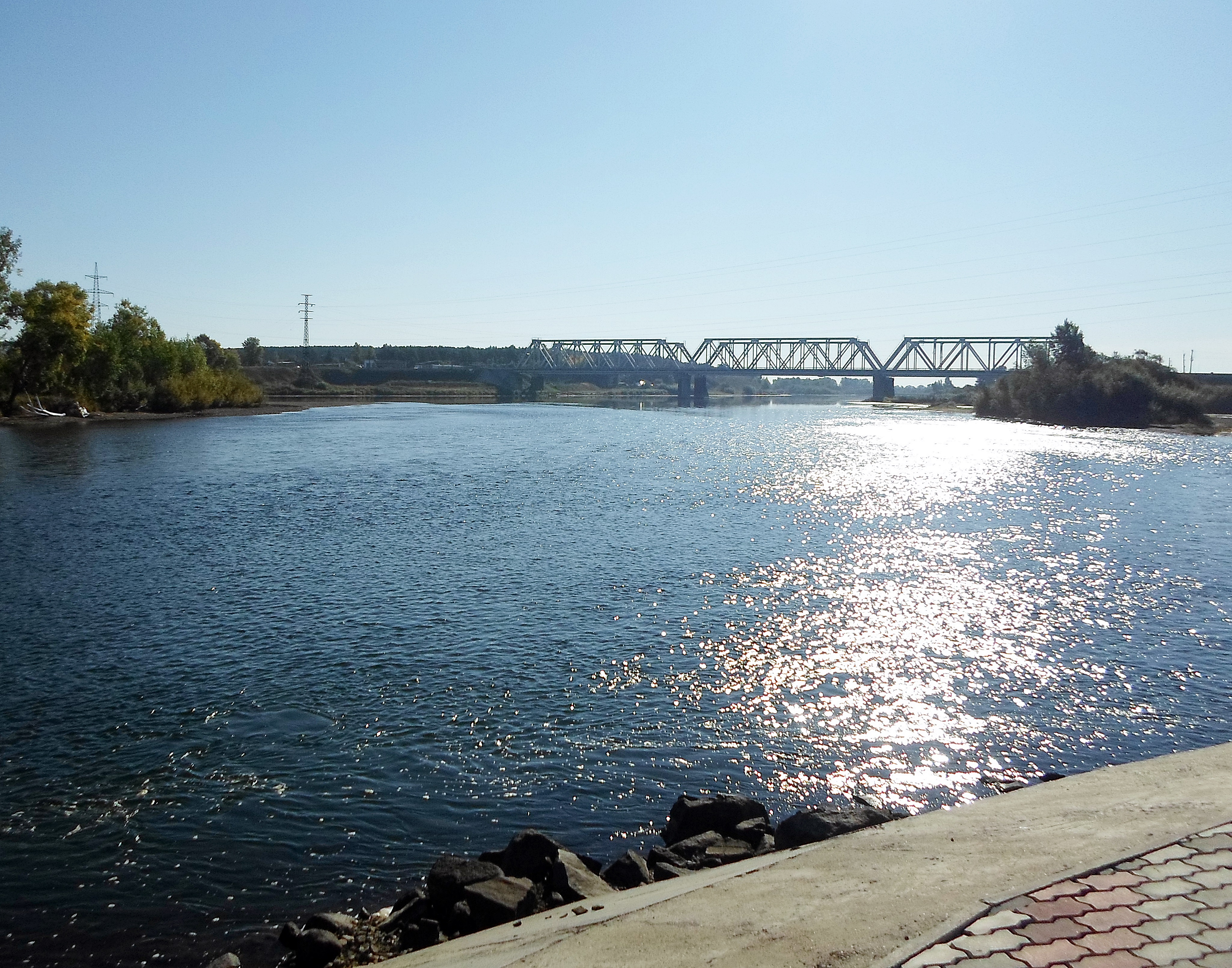 Железнодорожный мост Транссибирской магистрали через реку Кан в центре Канска. Красноярский край.